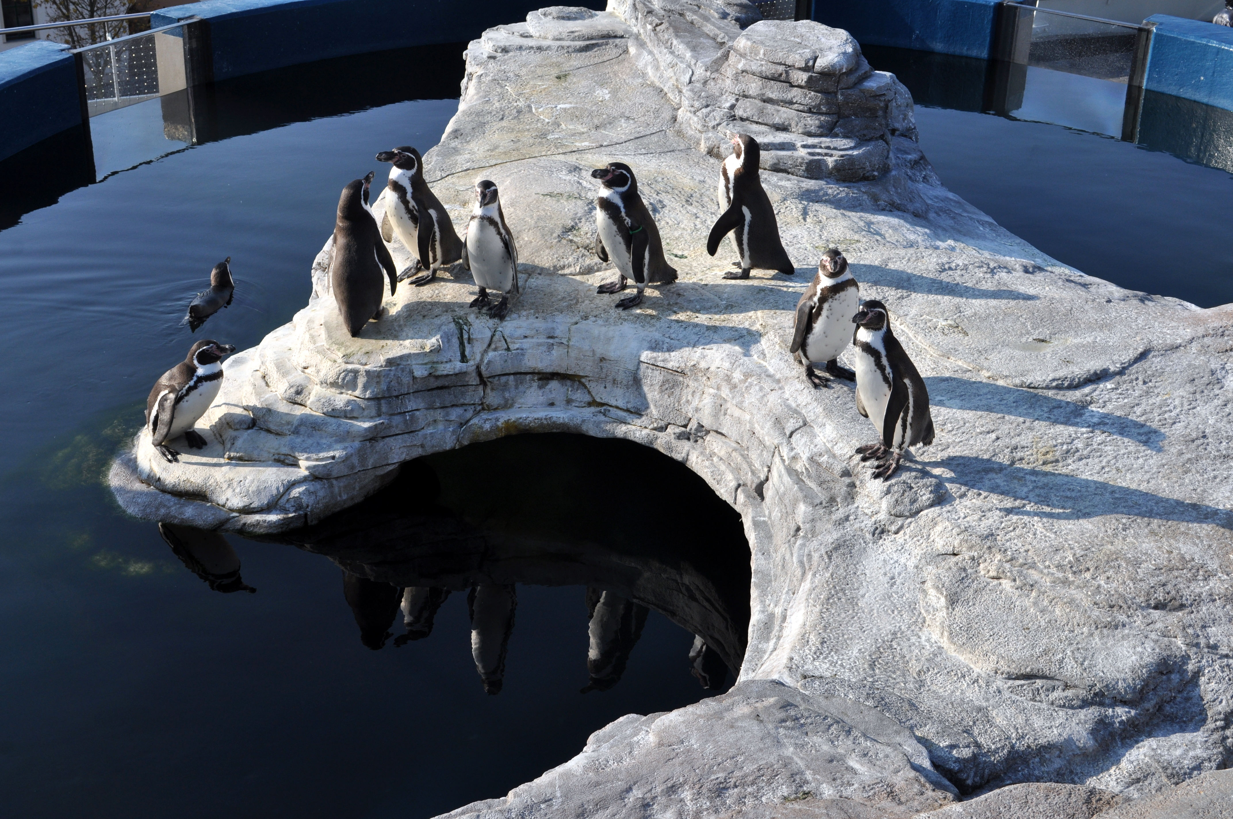 Die Pinguinanlage auf dem Dach des Ozeaneums in Stralsund.